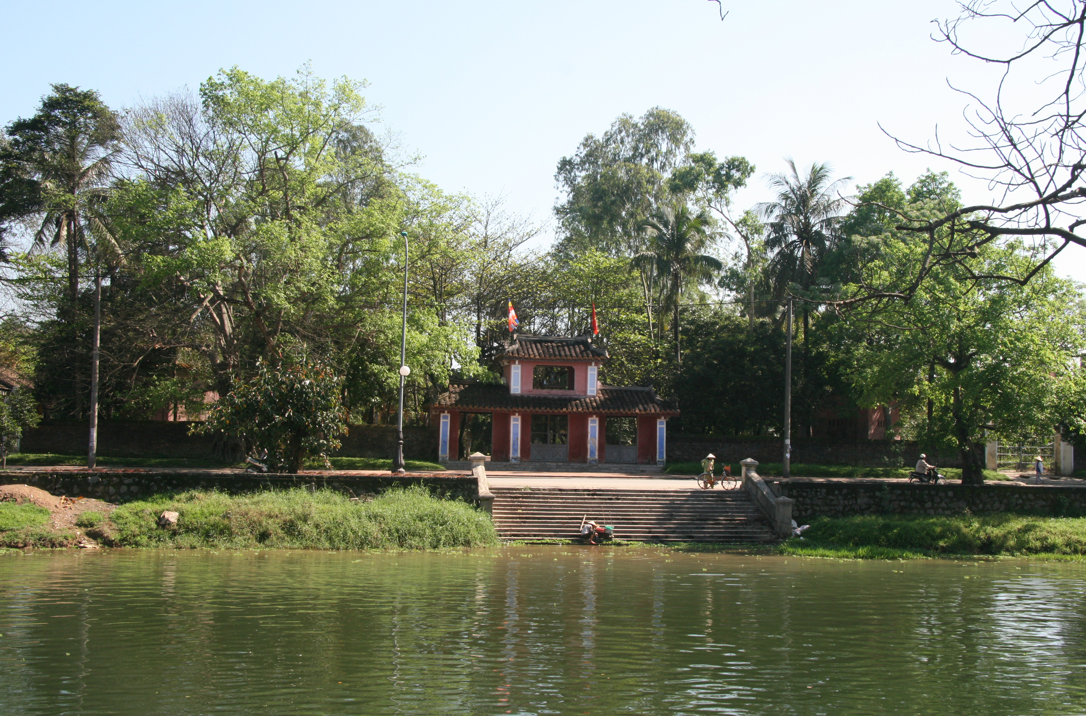 Chùa Diệu Đế (Dieu De Pagoda), Huế, Việt Nam